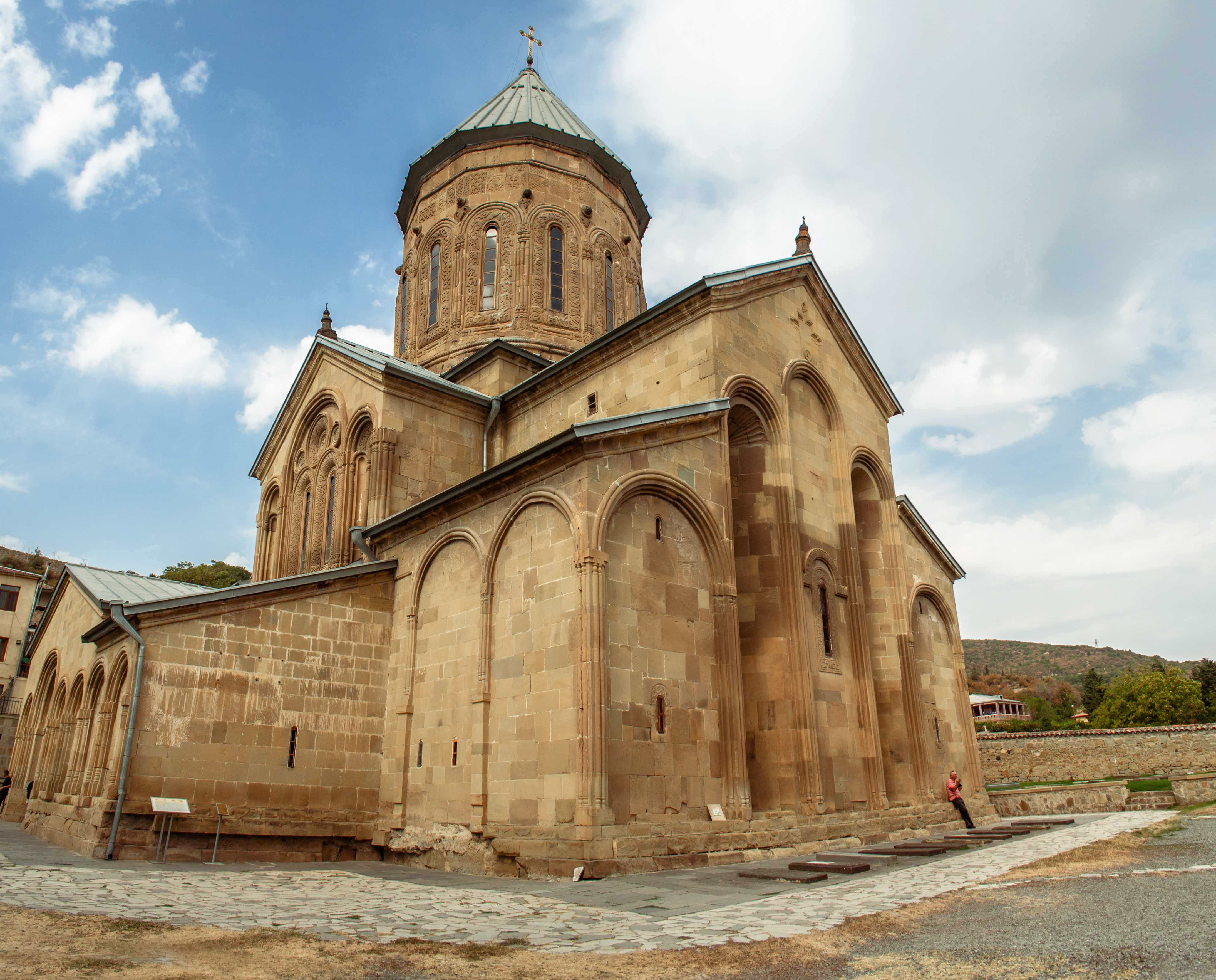 გუმბათიანი ტაძარი